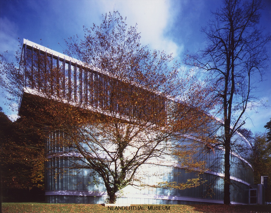 Neanderthal Museum